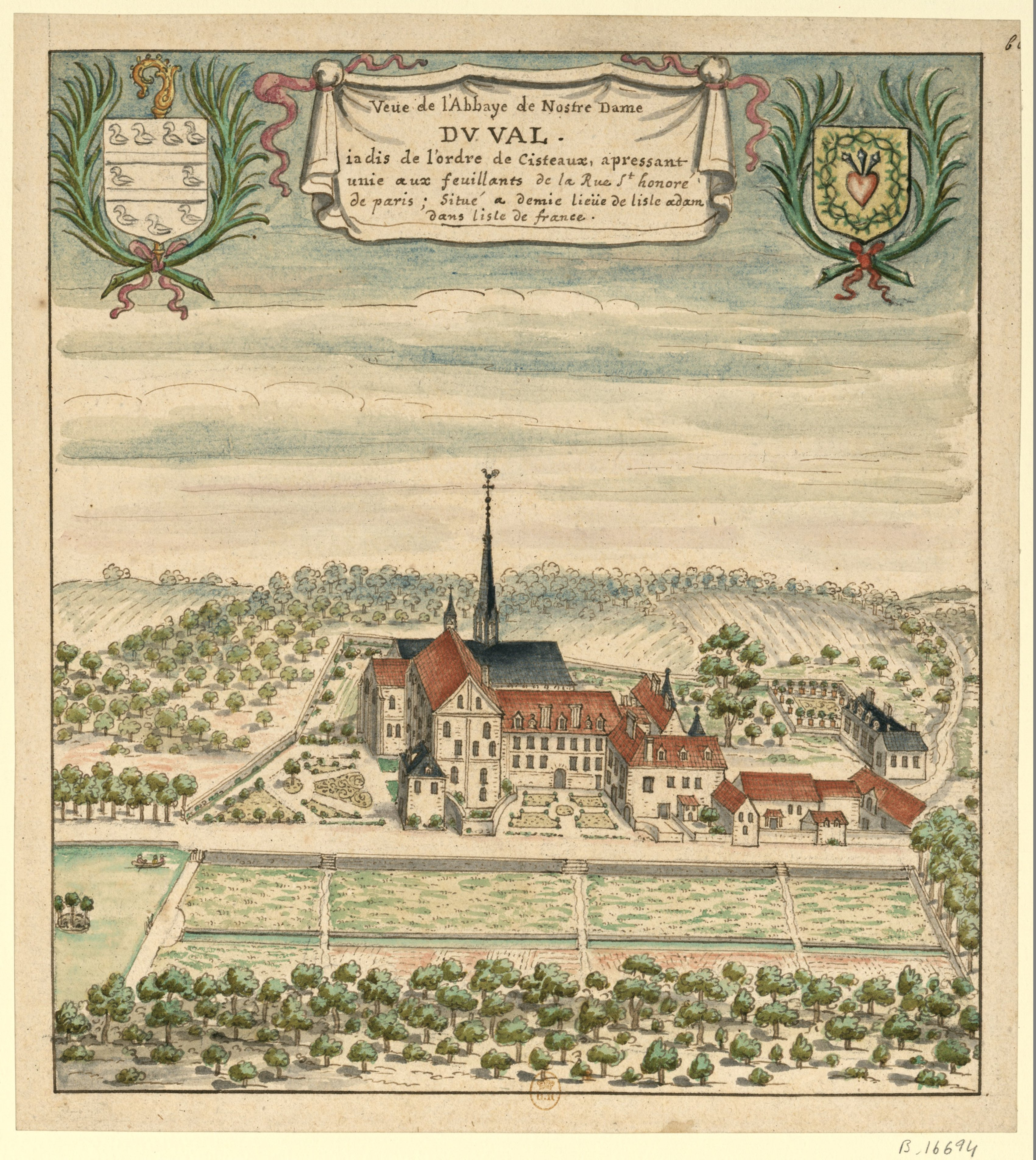 L'abbaye Notre-Dame du Val au debut du XVIIIe siecle (Val-d'Oise, France)